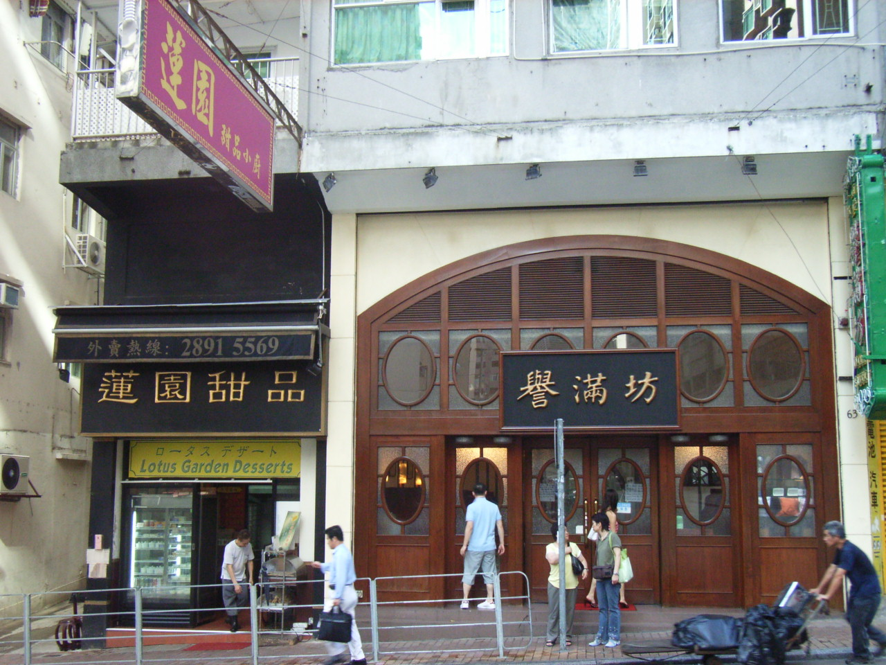 譽滿坊餐廳 在zh:跑馬地zh:成和道63號地下 Author: BEVERLYSHEN